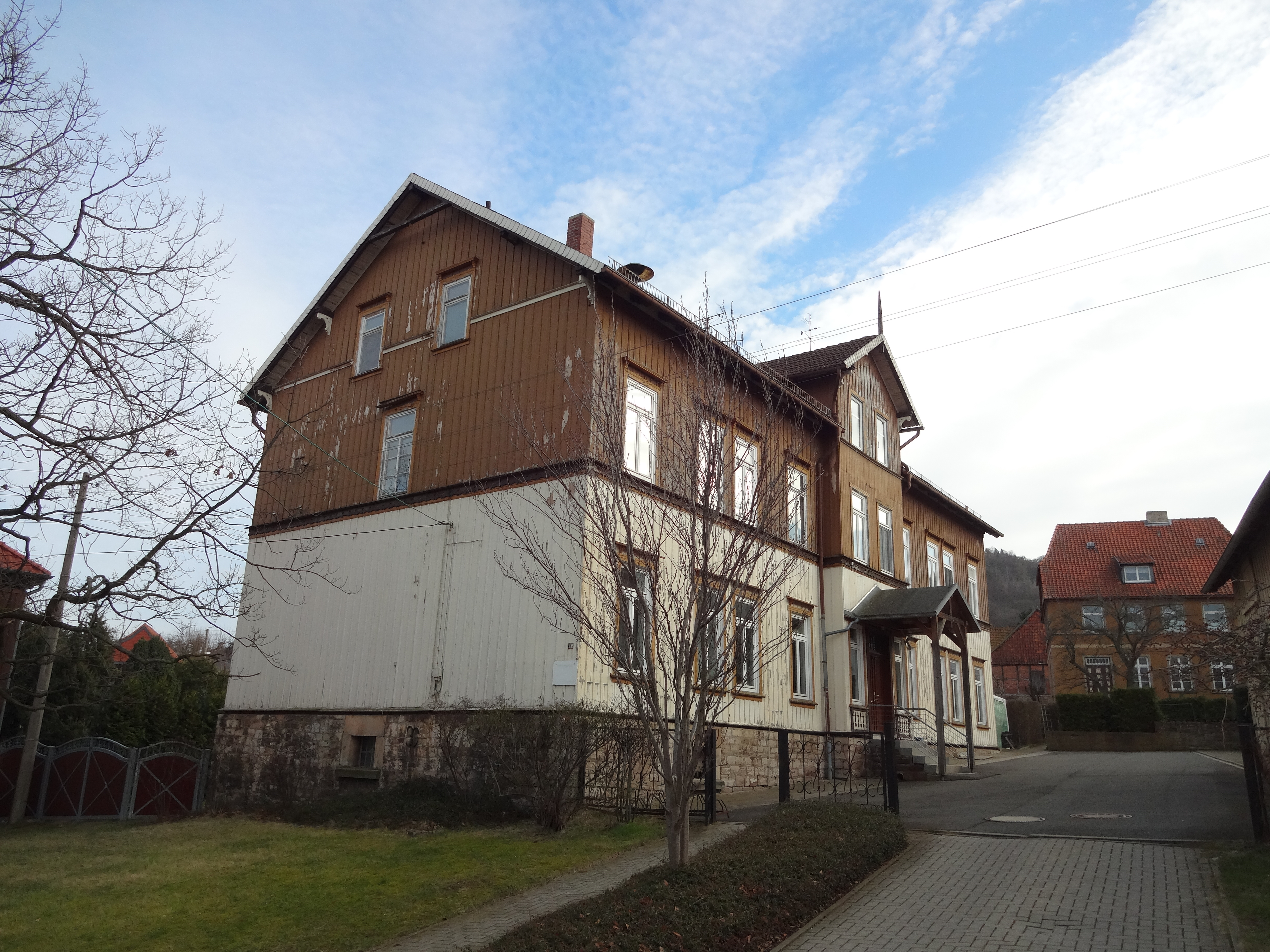 Denkmalgeschützte Schule in der Schulstraße 4 in Benzingerode (Ortsteil von Wernigerode)